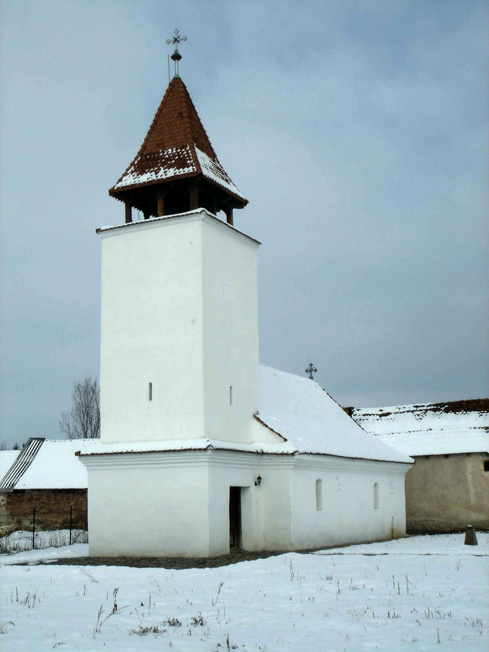 Biserica Adormirea Maicii Domnului din Belin